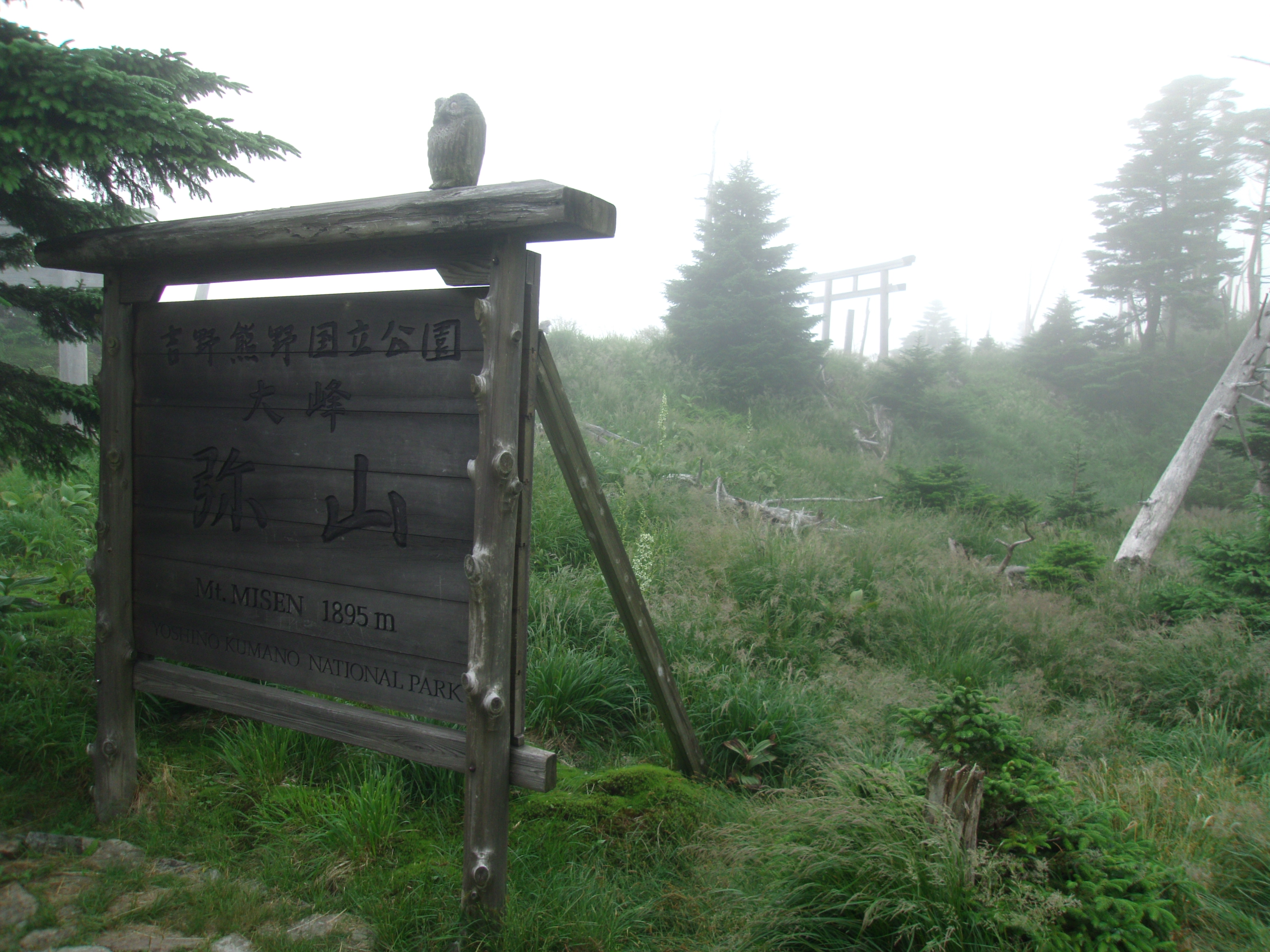 大峯奥駈道第54靡「弥山」山頂